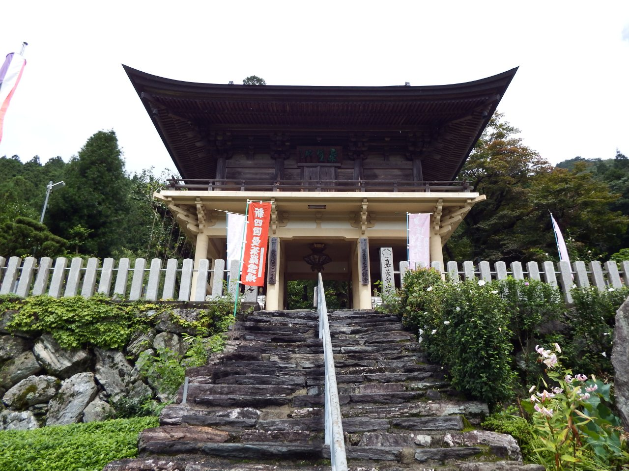 定福寺の山門